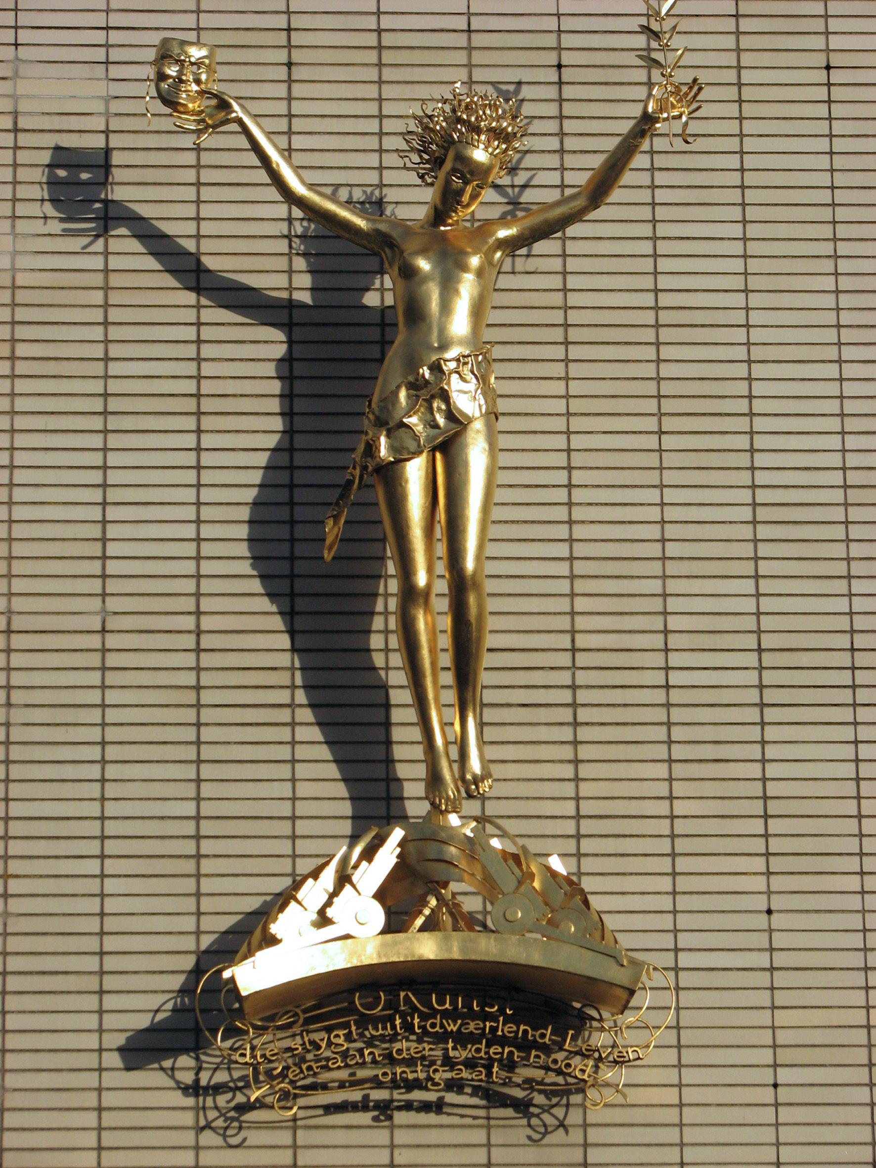 Afbeelding van het beeld van een muze gemaakt door de Utrechtse edelsmid Leo Brom, aan de voorgevel van de Stadsschouwburg (Lucasbolwerk 24) te Utrecht.